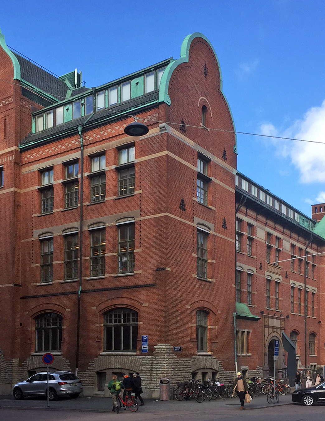 Fasadbild av Högskolan för Design och Konsthantverk, Konstnärliga fakulteten, Göteborgs universitet. Kristinelundsgatan. Arkitekt: Hans Hedlund. Byggnaden stod färdig 1904.